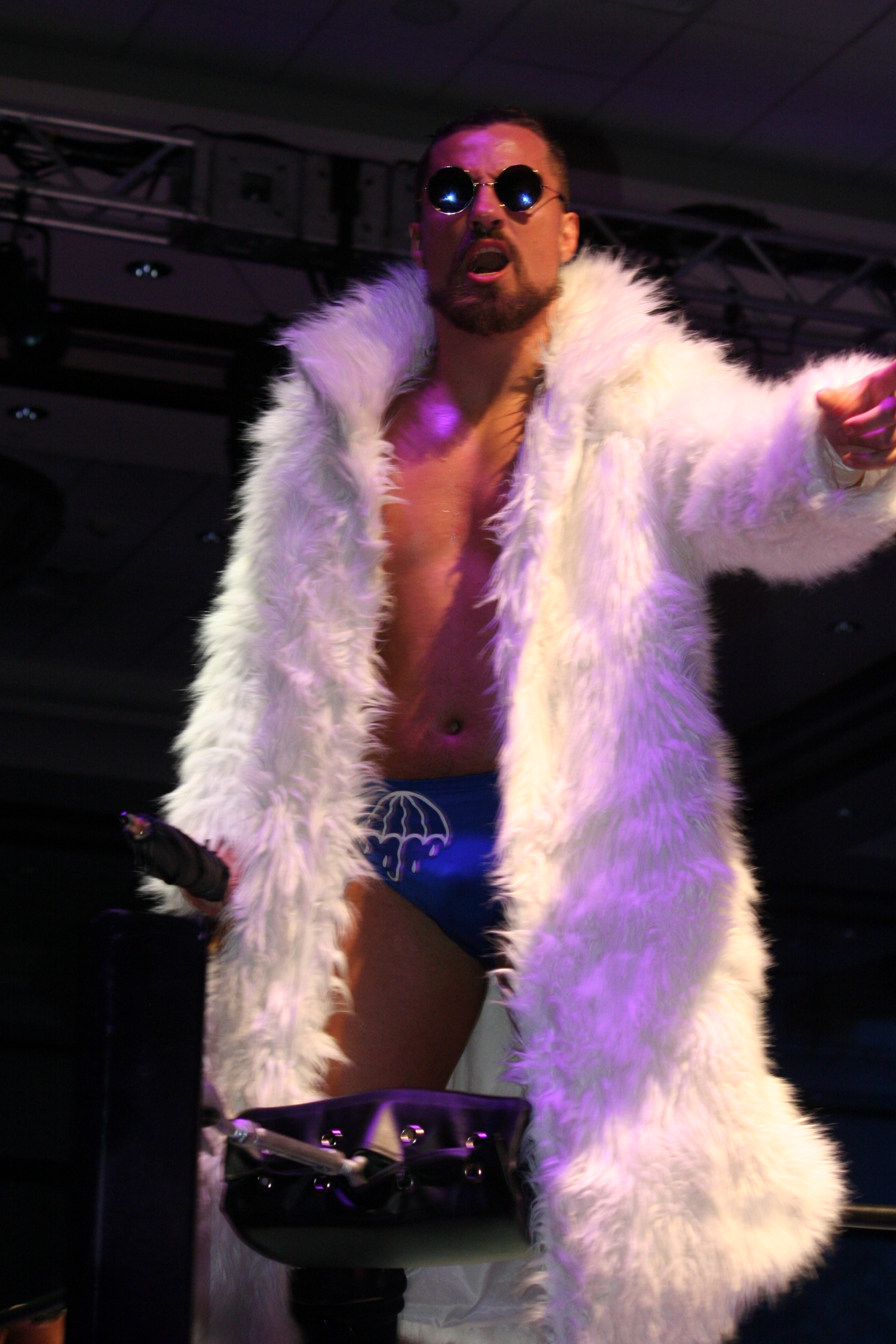 Le catcheur Marty Scurll entrant sur le ring en 2017.